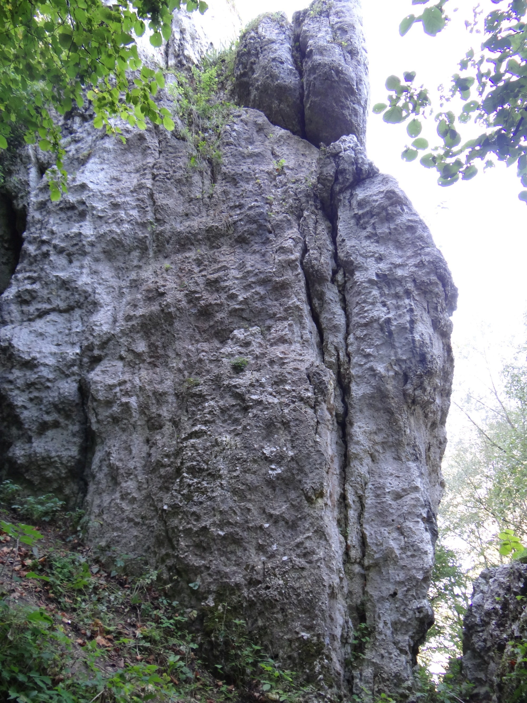 Gaudynowska Baszta w Dolinie Brodłówki